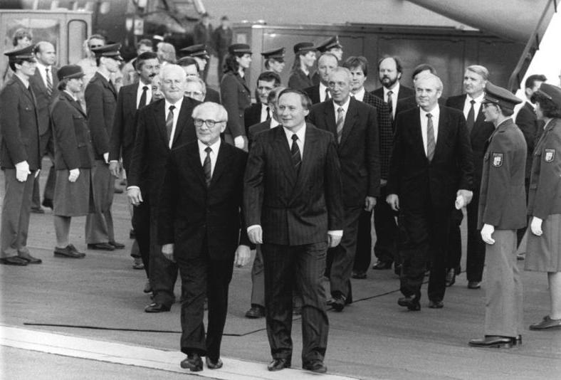 ADN-ZB Mittelstädt 9.9.87 BRD: Honecker-Besuch- Der Generalsekretär des ZK der SED und Vorsitzende des Staatsrates der DDR, Erich Honecker, ist in Saarbrücken, der Hauptstadt des Saarlandes, eingetroffen. Auf dem Flughafen Enshaim hieß ihn der Ministerpräsident des Saarlandes, Oskar Lafontaine (vorn r.), herzlich willkommen.